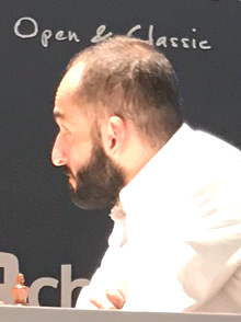 Samvel Ter-Sahakyan, Runde 9 der Grenke Chess Open 2019 in Karlsruhe.